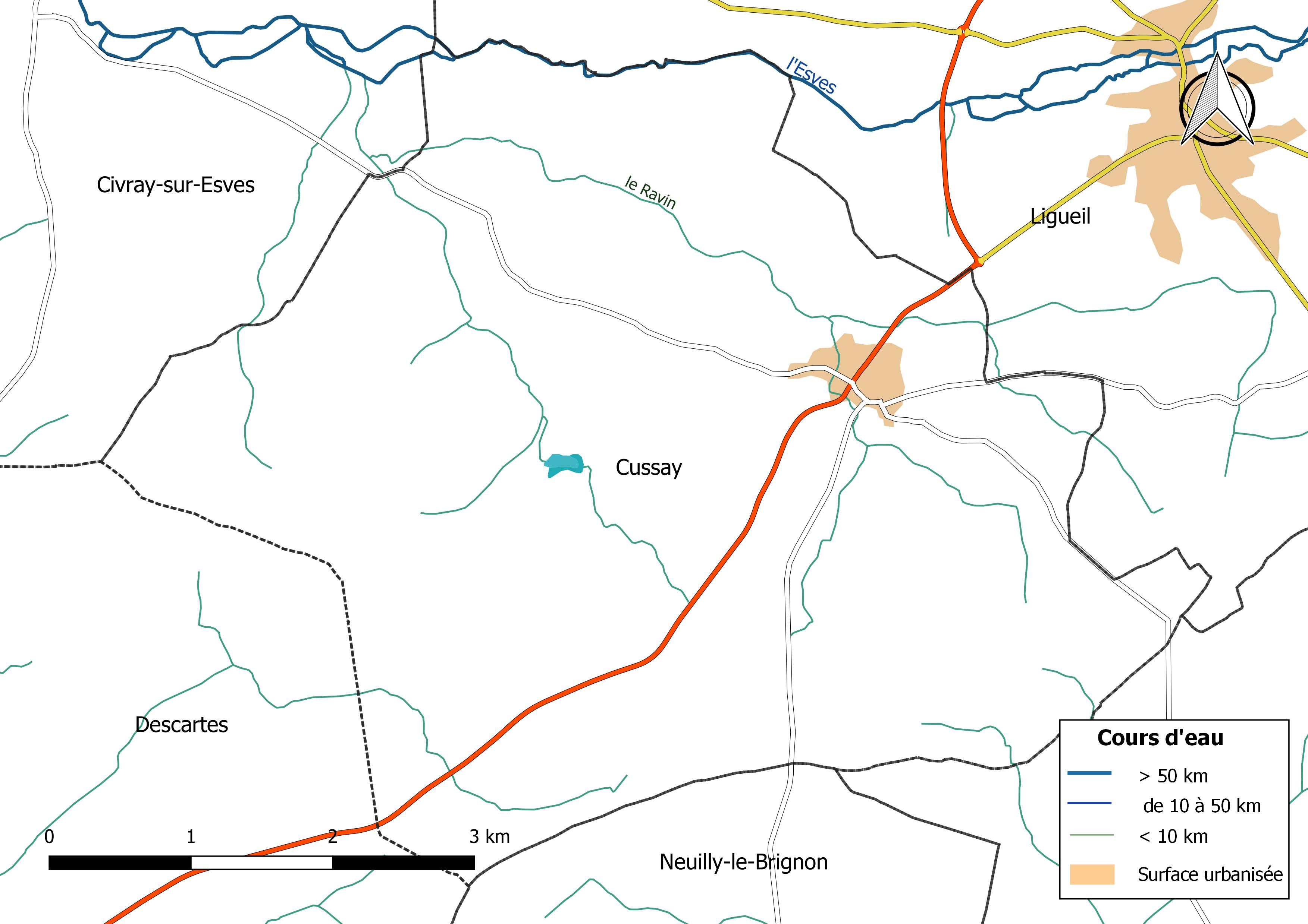 Carte du réseau hydrographique de la commune de Cussay (France).